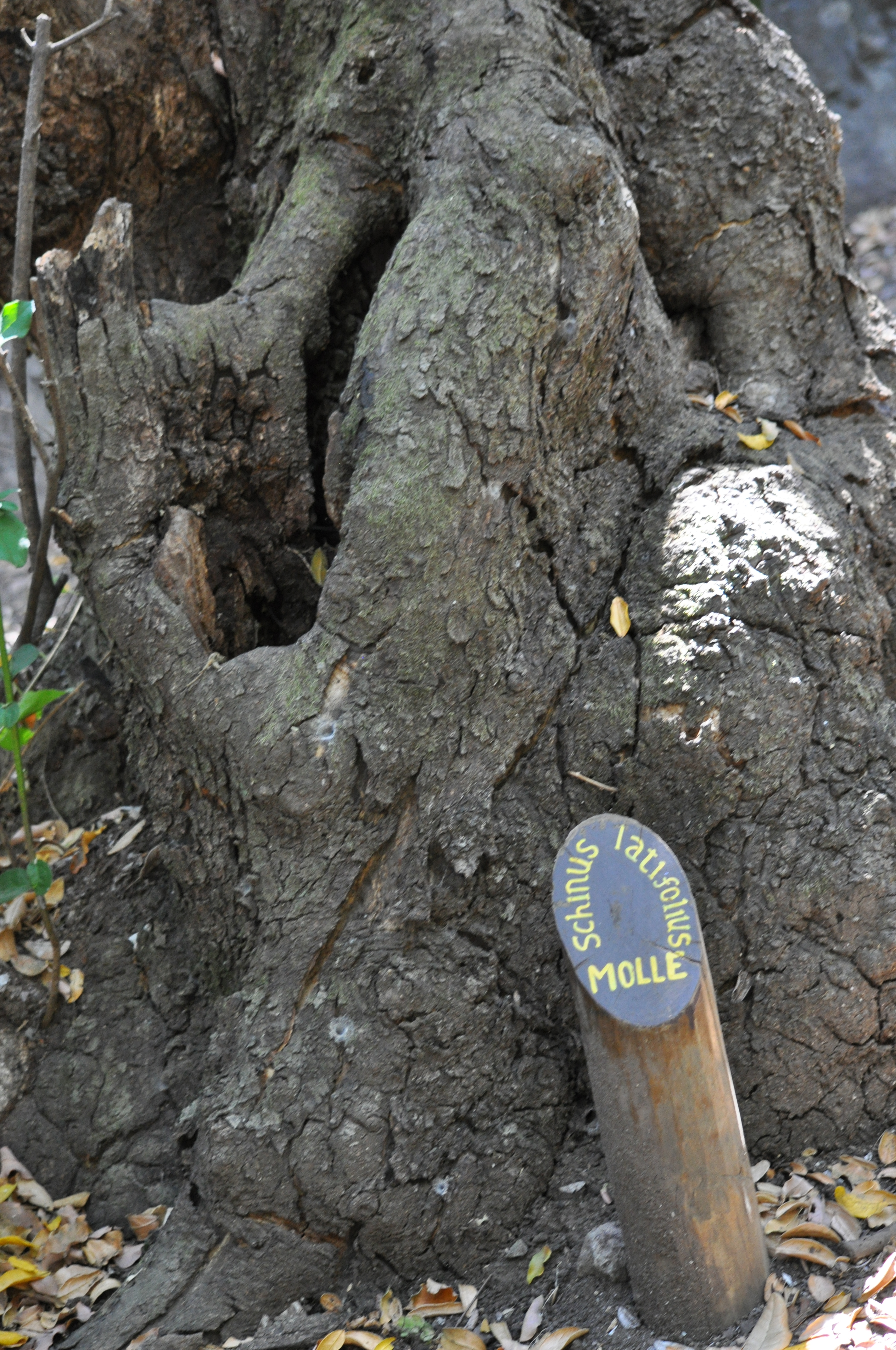 Un ejemplar añoso de Schinus latifolius (molle) en el parque nacional La Campana, Región de Valparaíso, Chile. Circuito La Canasta.